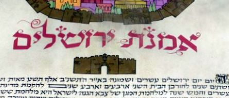 1992 "פרט מתוך "אמנת ירושלים